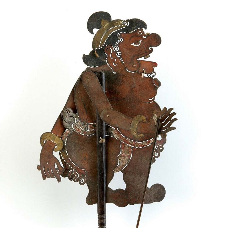 Schaduwfiguur. Wajangpop van karbouwenhuid, voorstellende Merdah Unknown language: Wayang kulit